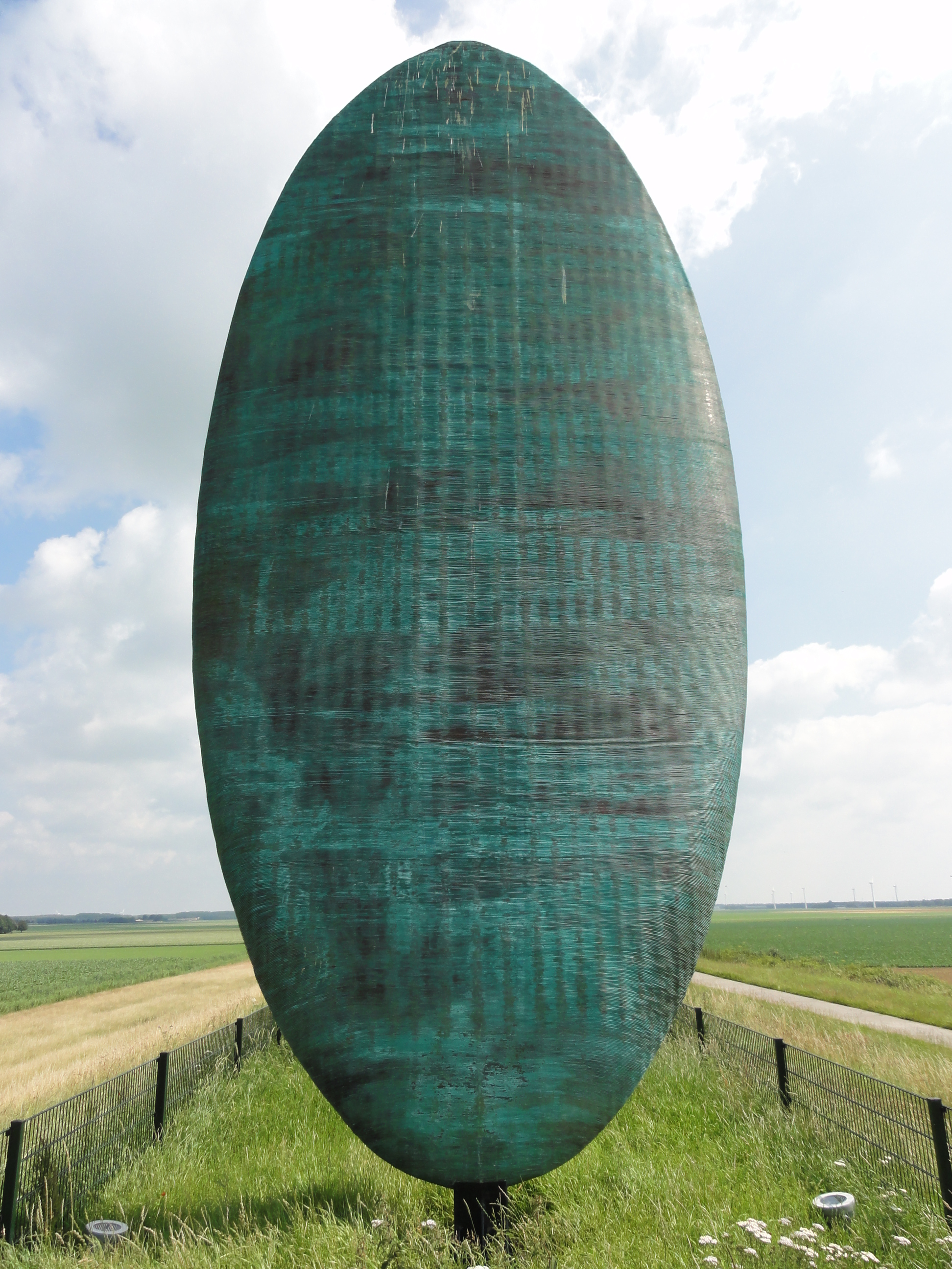 Kunstwerk Lucifers Tong (een reusachtig ovaal kunstwerk van Rudi van de Wint uit 1993) op de Knardijk bij Lelystad.